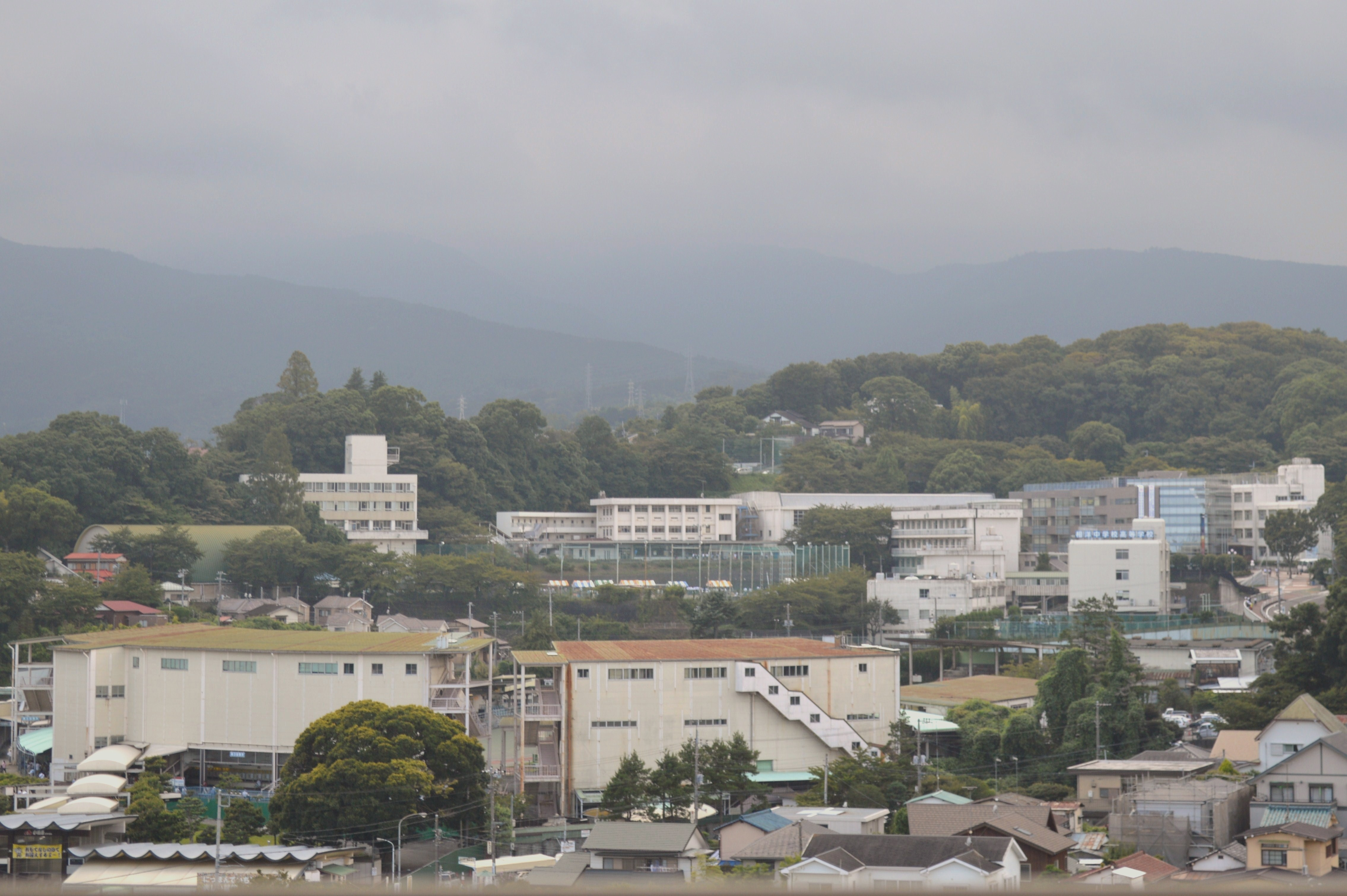 神奈川県小田原市にある相洋中学校・高等学校、小田原城天守閣から撮影